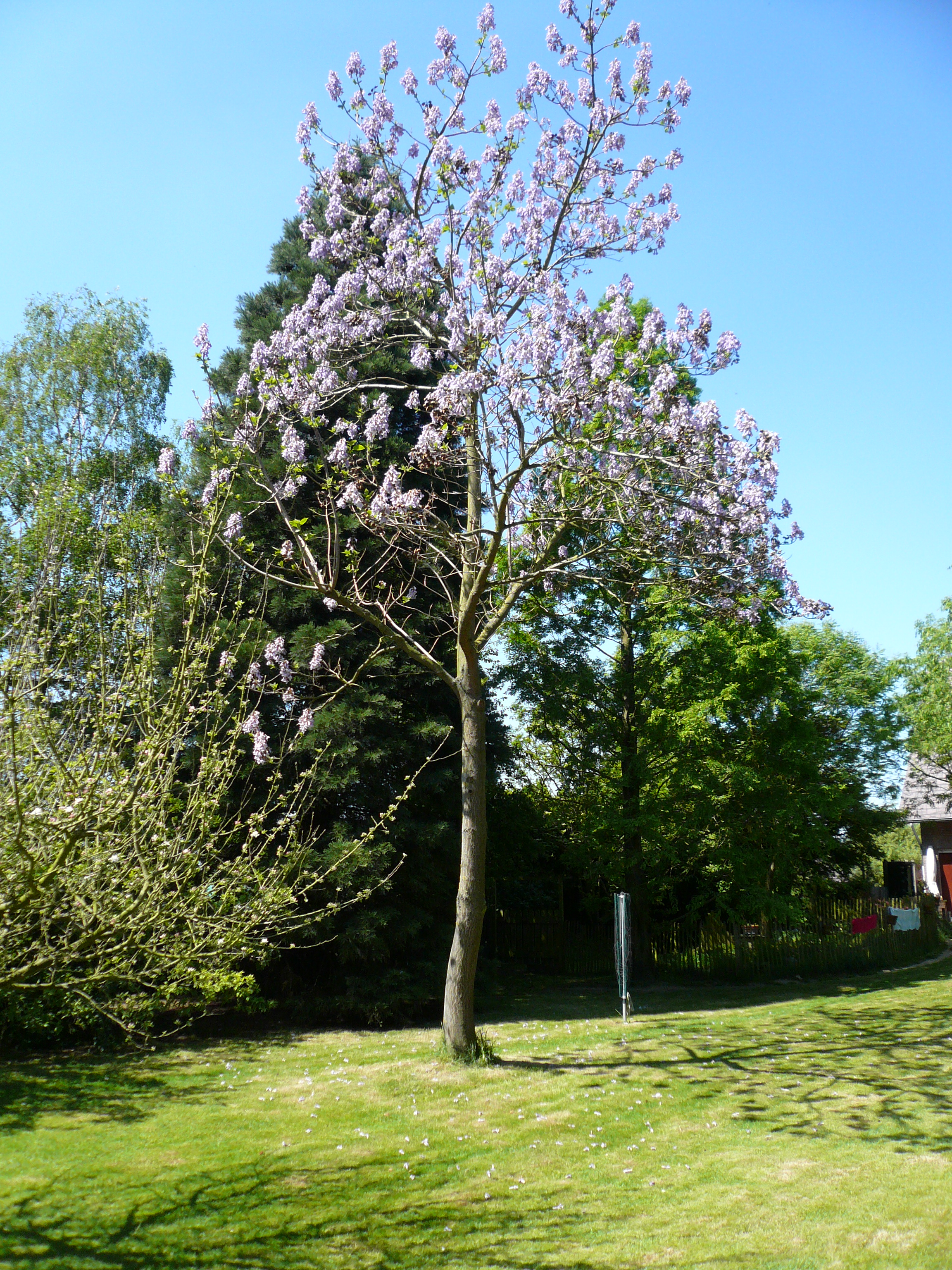 Paulownia tomentosa en fleur